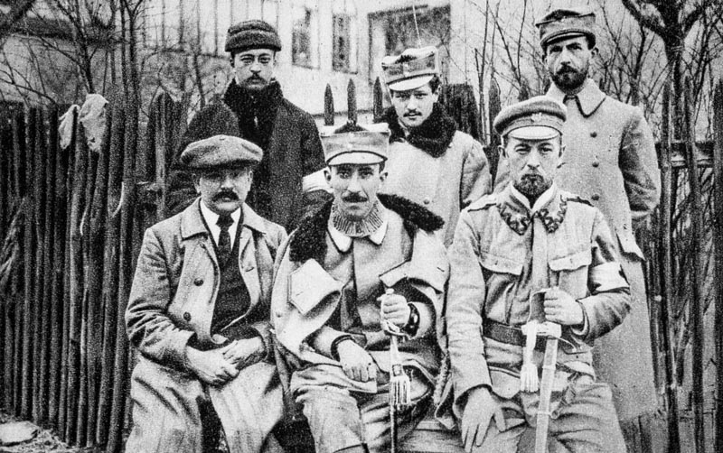 Lekarze I Brygady Legionów Polskich. Od lewej siedzą: dr Tadeusz Koźniewski, dr Emil Bobrowski, dr Witold Umiastowski. Od prawej stoją: inż. M. Ponikiewski, dr Ryszard Zacharski.